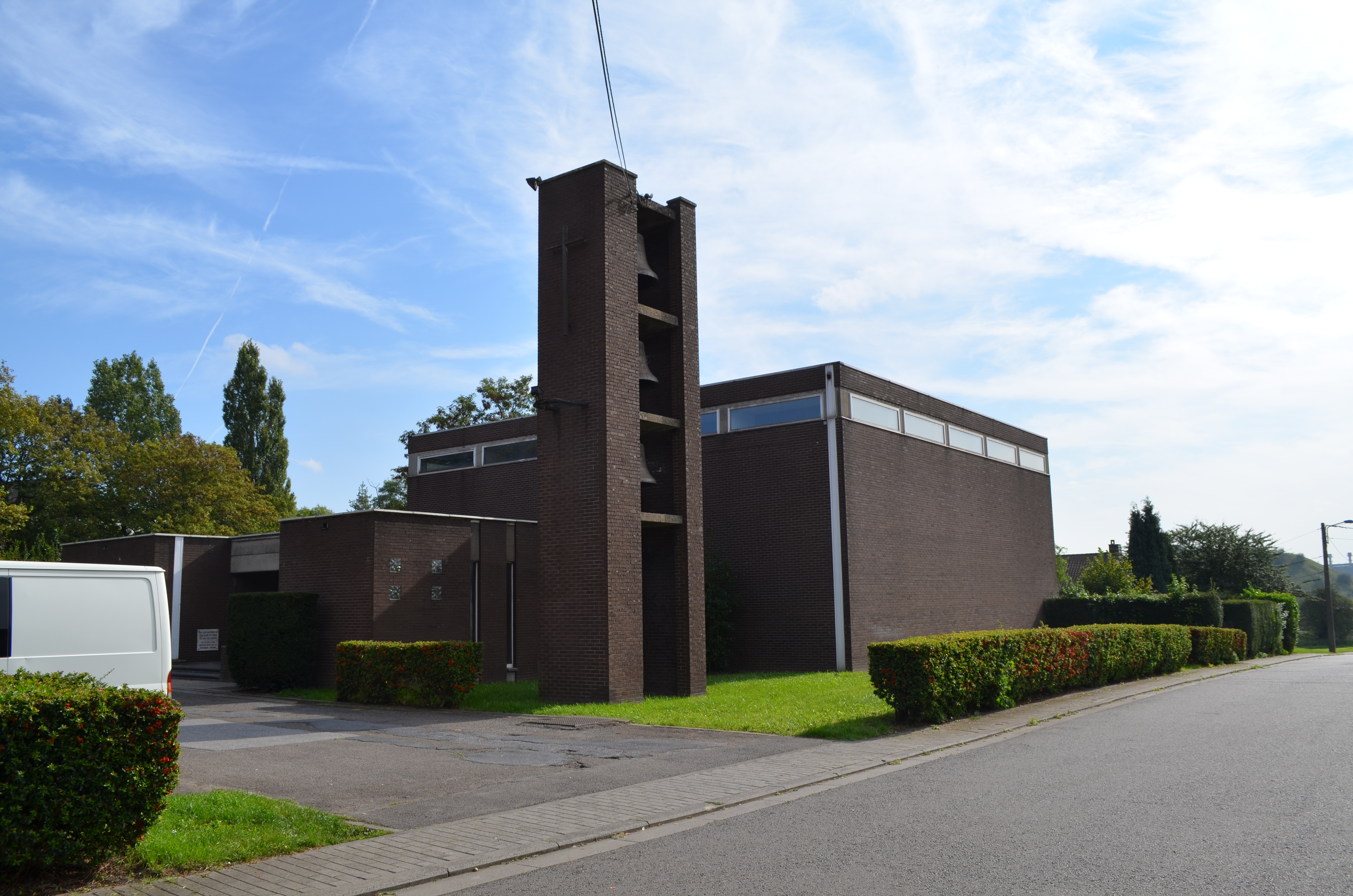 Dampremy (Charleroi-Belgique) - Eglise Saint-Remy